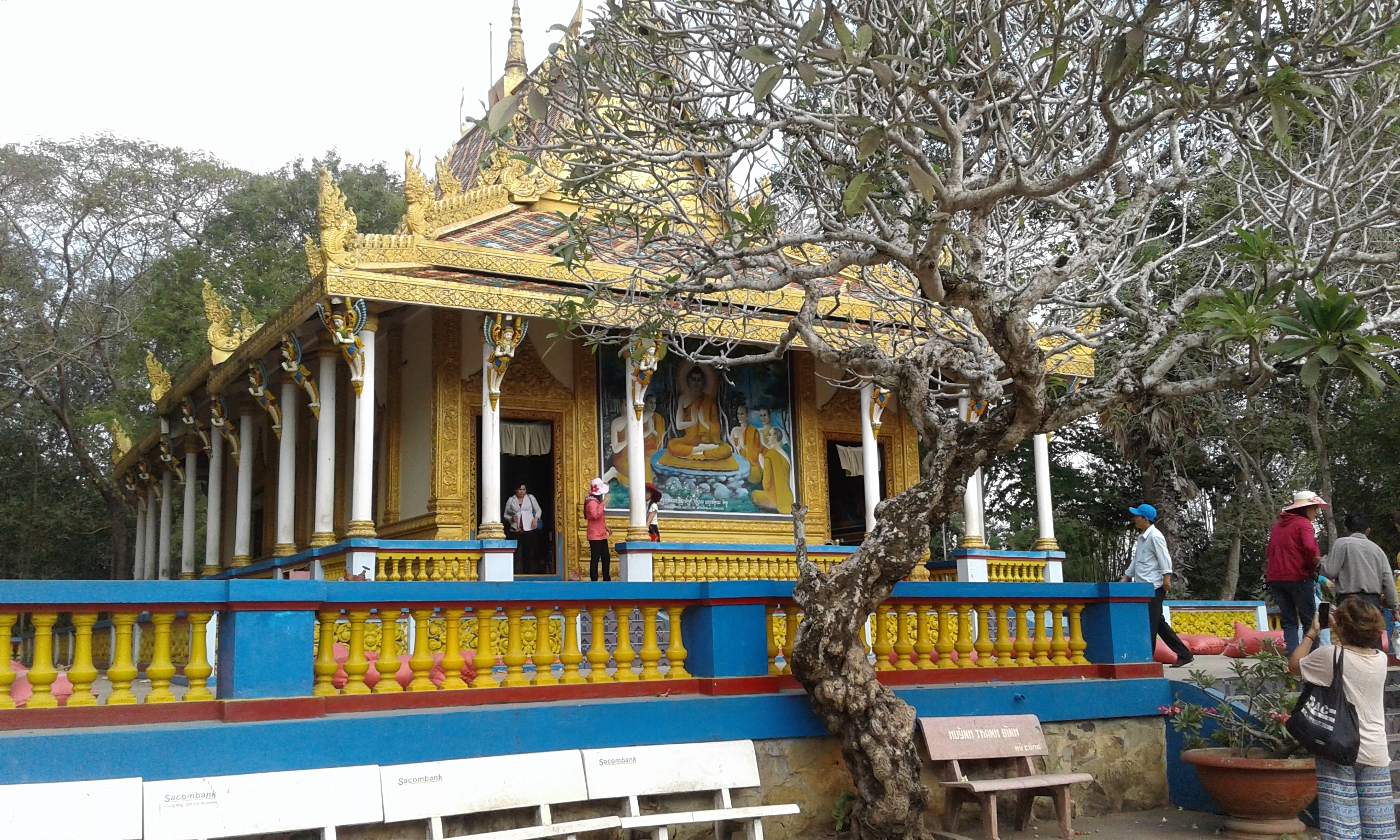 Chánh điện chùa Dơi (3/2016)